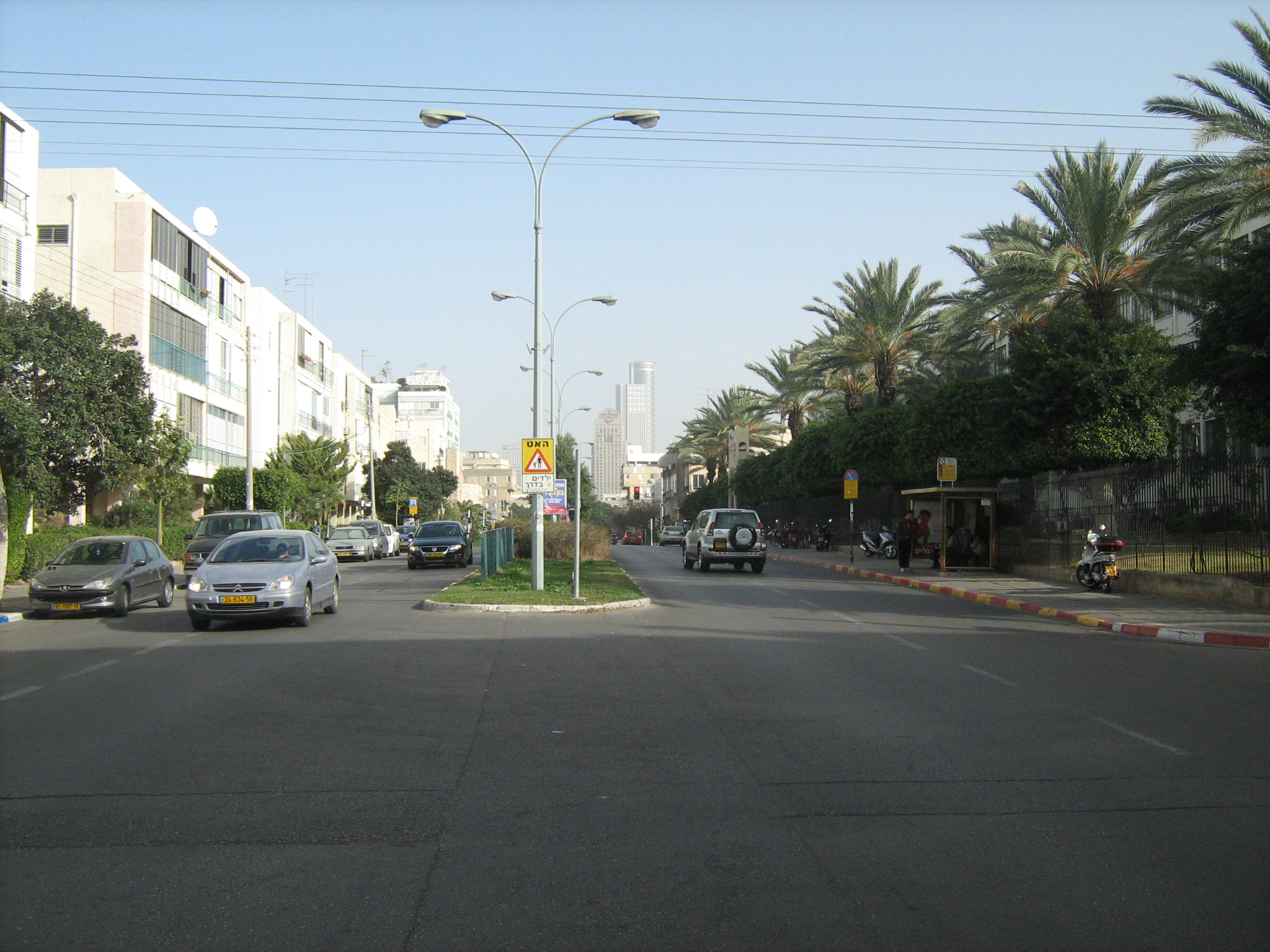 רחוב ז'בוטינסקי ת"א